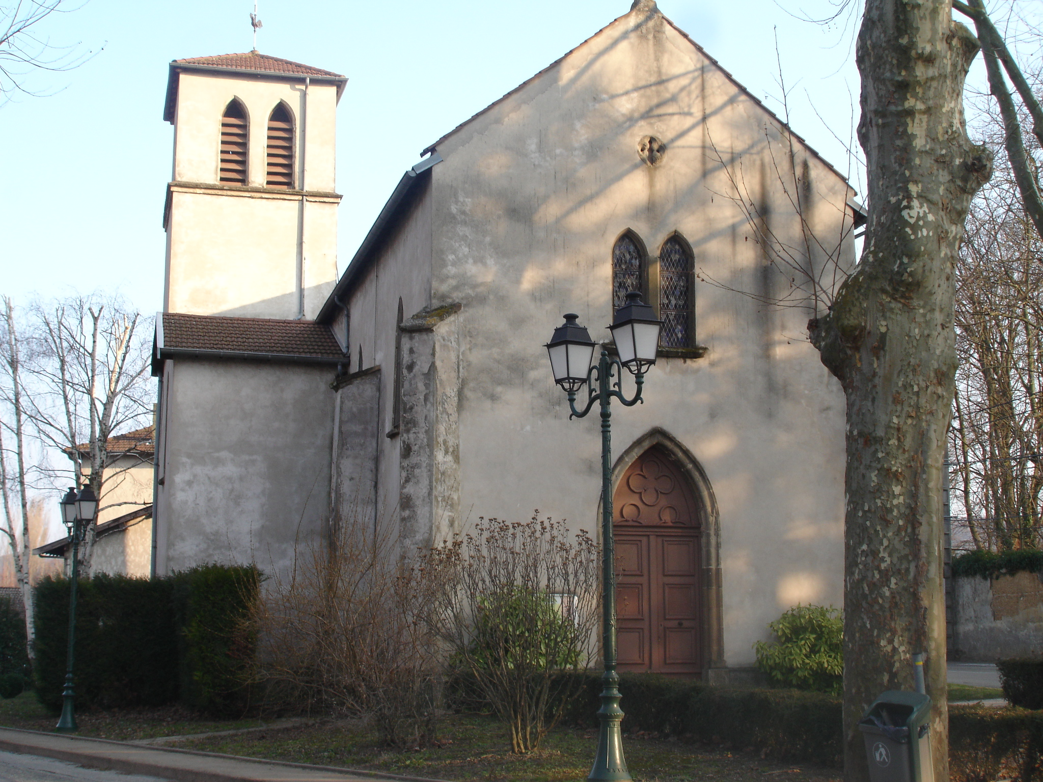 Simandres (69) : L'église